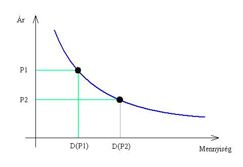 Keresleti függvény